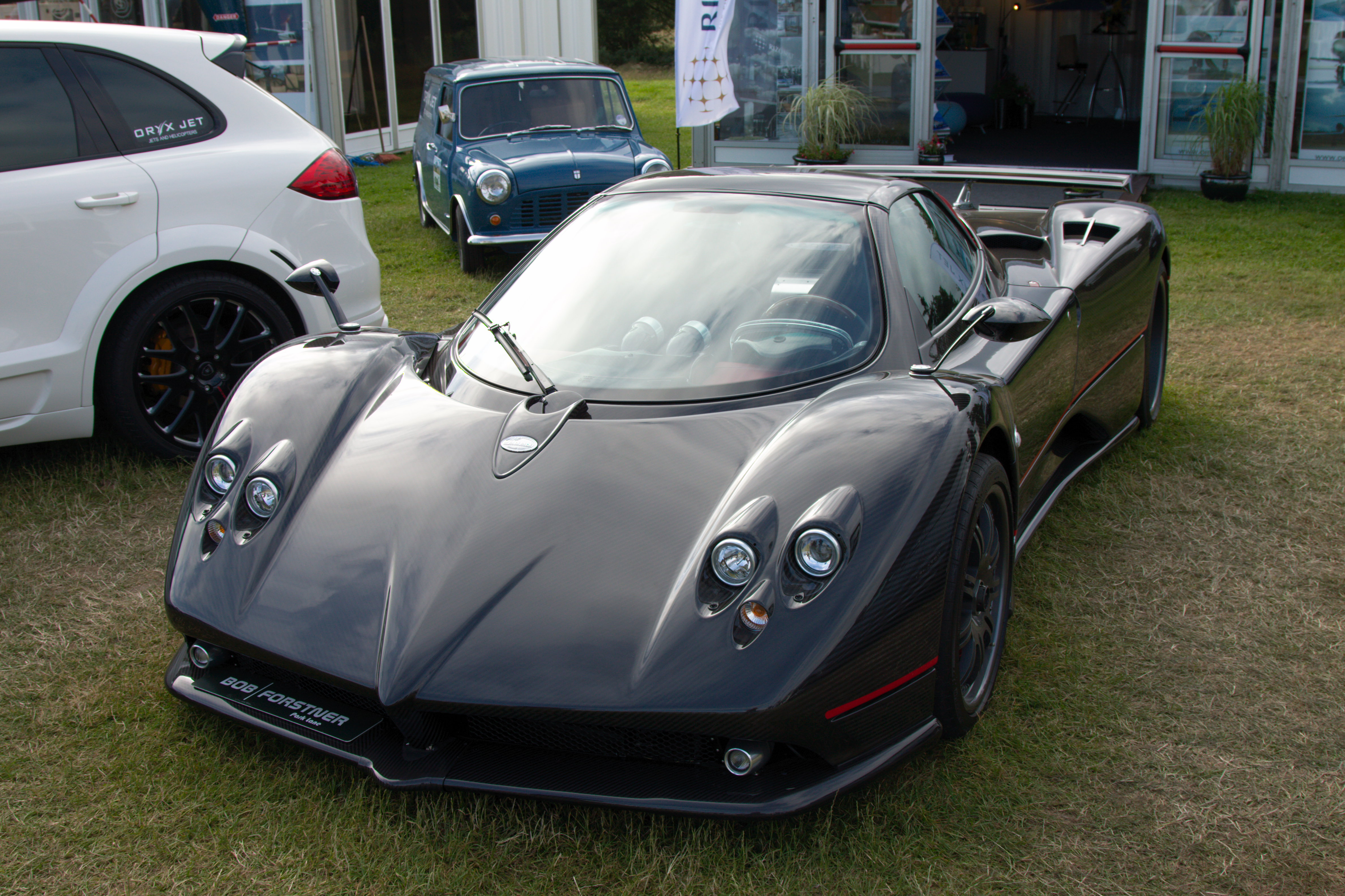 Pagani Zonda